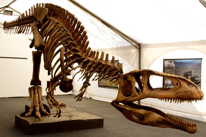 Pasar por debajo del esqueleto de un dinosaurio de 118 millones de años y 12.2 metros de largo,[1] es sólo la puerta de entrada al mundo de la paleontología. Modelos en vivo a escala real de las especies descubiertas en la Argentina te invitan a un espacio para que los niños realicen sus propios hallazgos y para que los grandes también se sientan parte de la ciencia nacional.